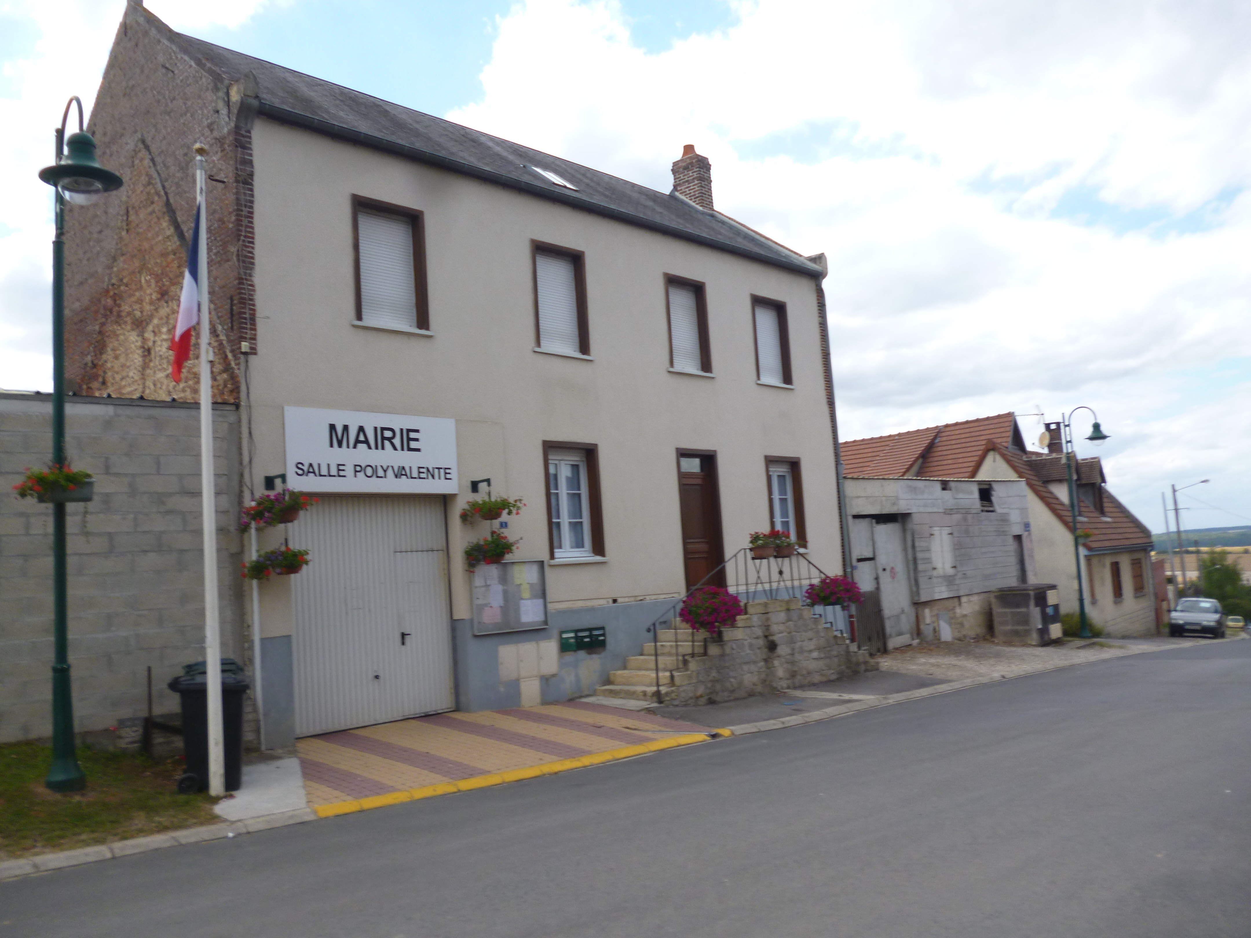 Mairie de Beauvoir (Oise).